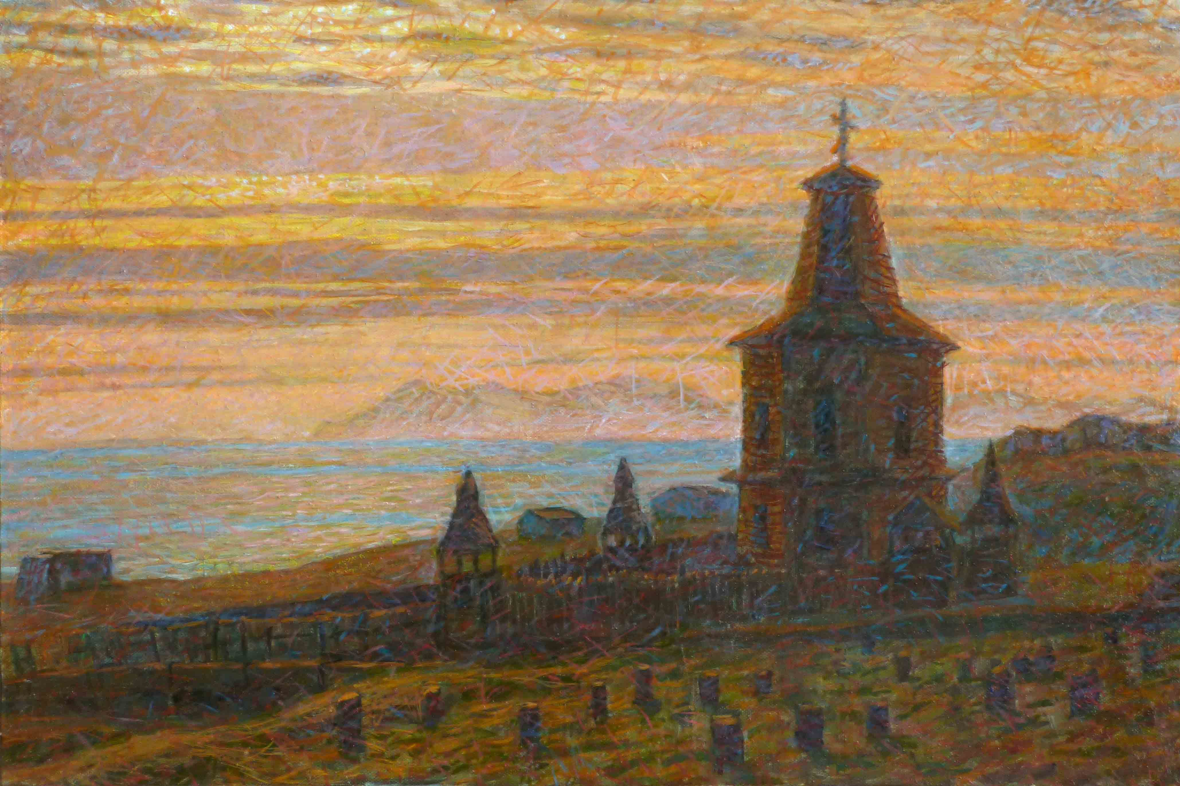 Вид на деревянную часовню в российском посёлке Баренцбург на архипелаге Шпицберген. Сделана работа по кратковременному наброску, созданному во время участия в международной экспедиции Михаила Малахова "Полярный меридиан. Щпицберген-2014".